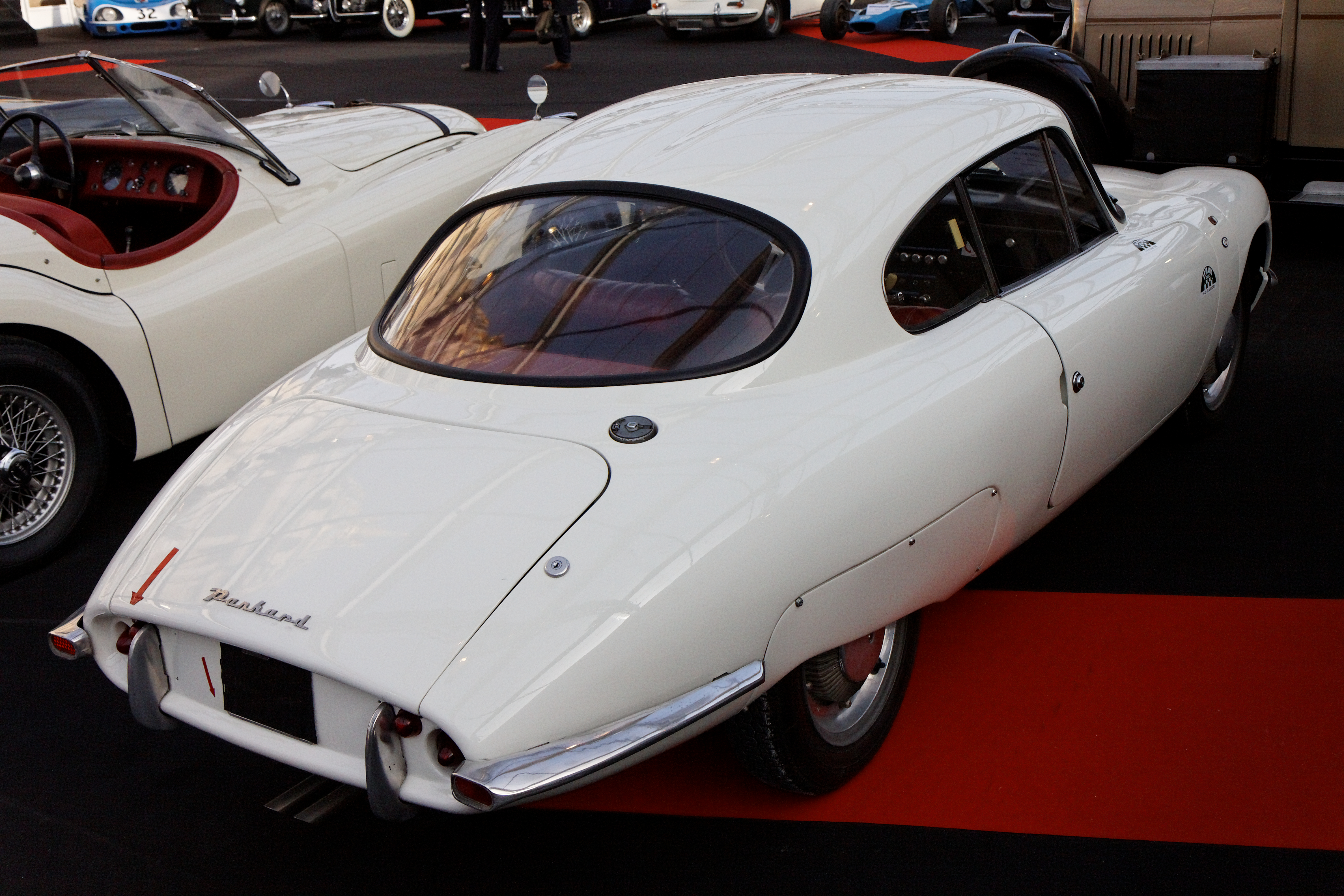 Panhard CD - Festival Automobile International 2011 - Vente aux enchères